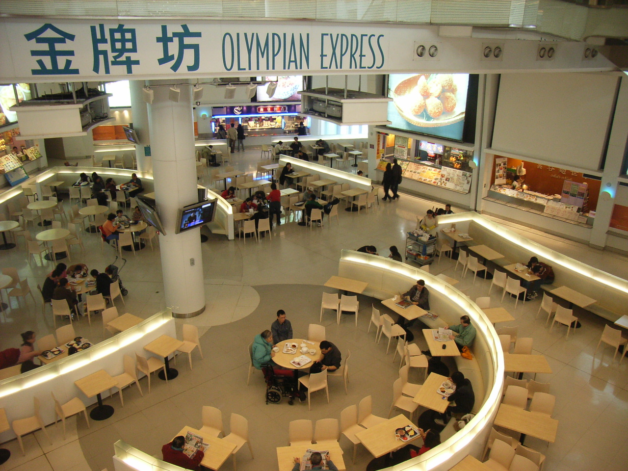 奧海城 (Olympian City)，是為zh:香港zh:九龍zh:大角咀zh:西九龍填海區內的建築群，屬於地鐵zh:奧運站一、二期物業發展項目，是九龍區主要zh:商場及zh:住宅之一，商場部分由zh:信和置業發展及管理，住宅部分則由信和置業及zh:地鐵有限公司共同發展及zh:物業管理。 Photo by User:OLAMB